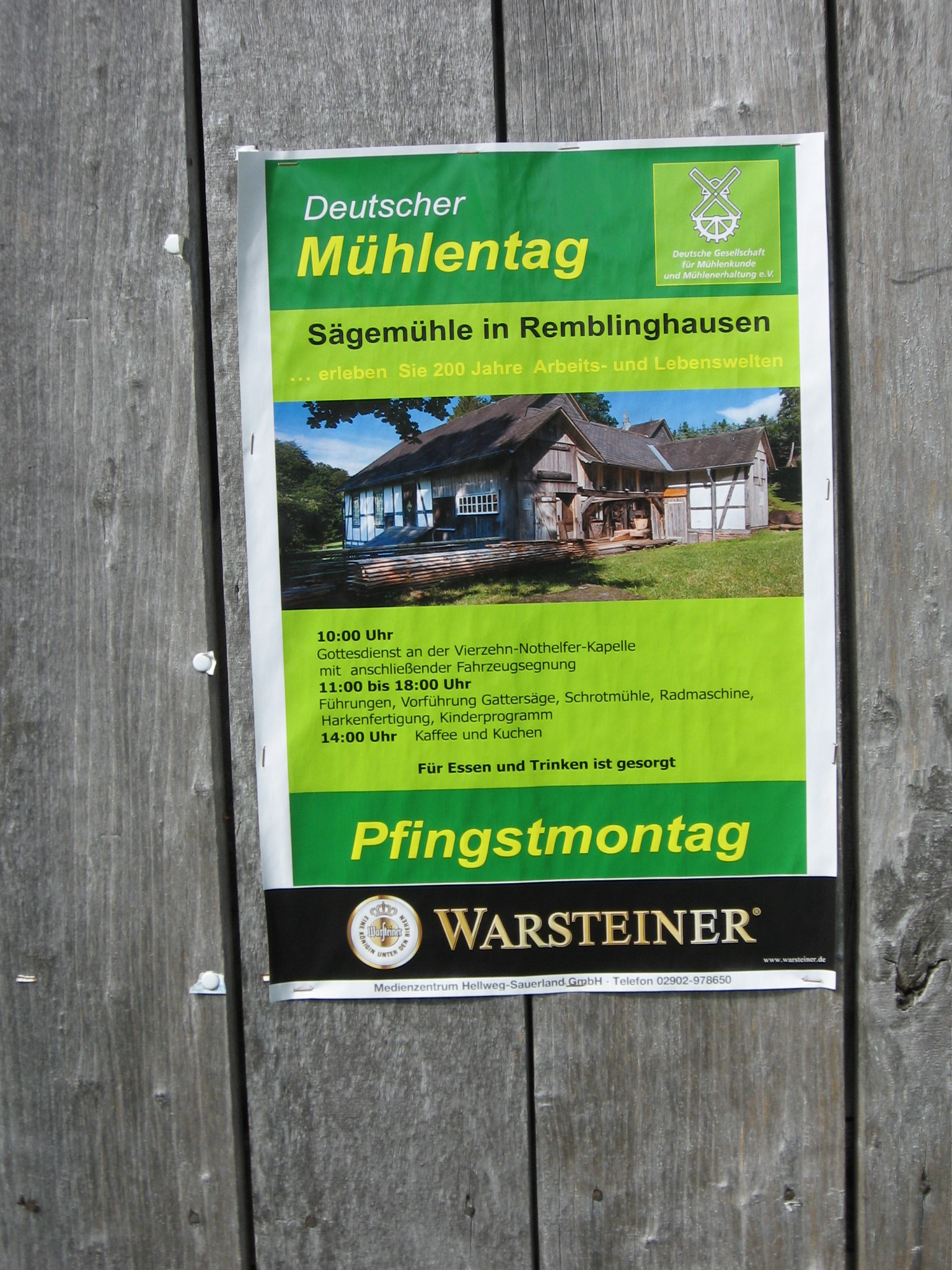 Plakatt an der Sägemühle über Veranstaltung am Deutschen Mühlentag.